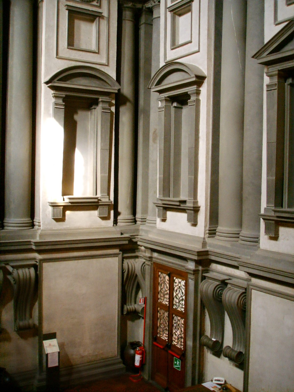 Biblioteca medicea laurenziana vestibolo